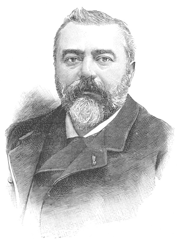 "M. Baret, maire de Marseille". Joseph Marie Louis Félix Baret.